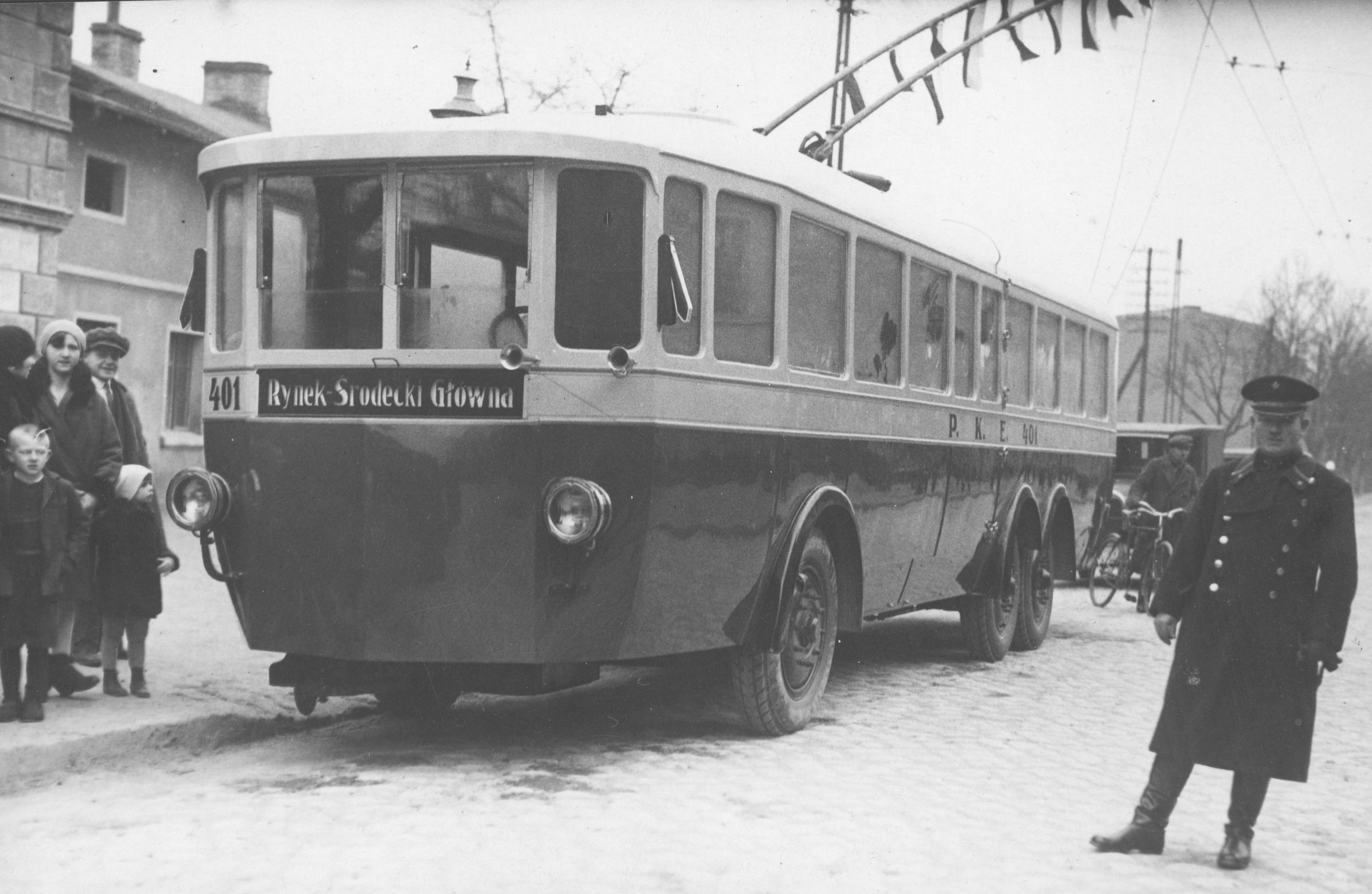 Widok trolejbusu podczas uroczystości otwarcia linii.